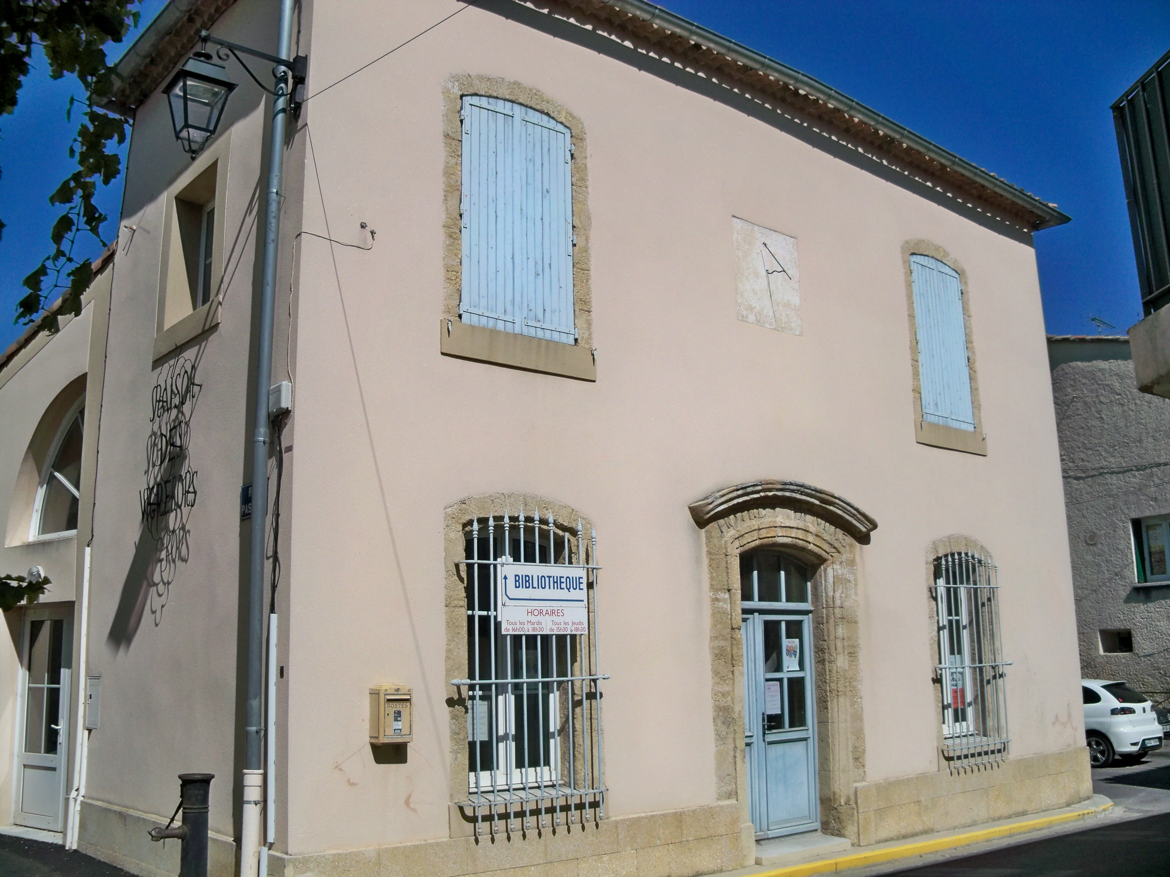 Maison des Vigneron de Violès (ancienne Mairie), Vaucluse, France